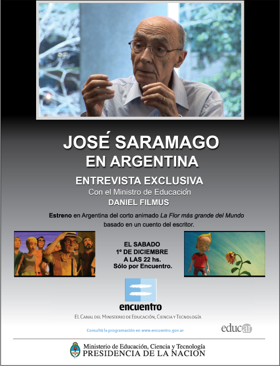 Afiche de presentación de la entrevista al escritor con motivo del estreno en Argentina (Canal Encuentro del Ministerio de Educación) del cortometraje "La Flor mas grande del Mundo" basado en un cuento del autor.